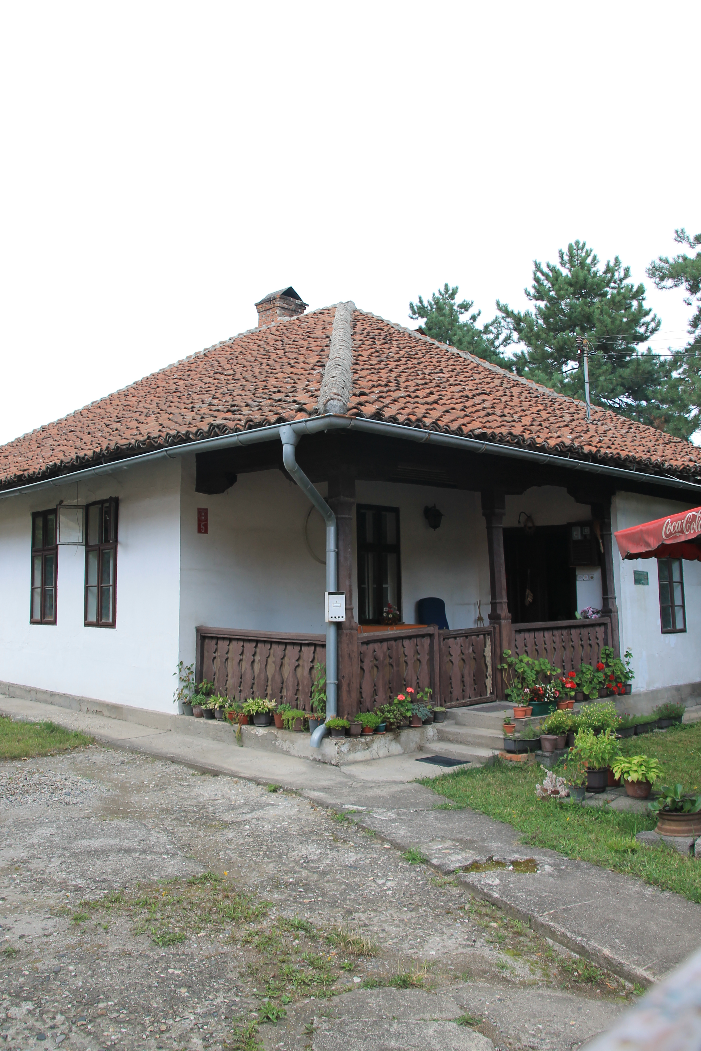 Kuće u Svetozara Markovića (Kragujevac)